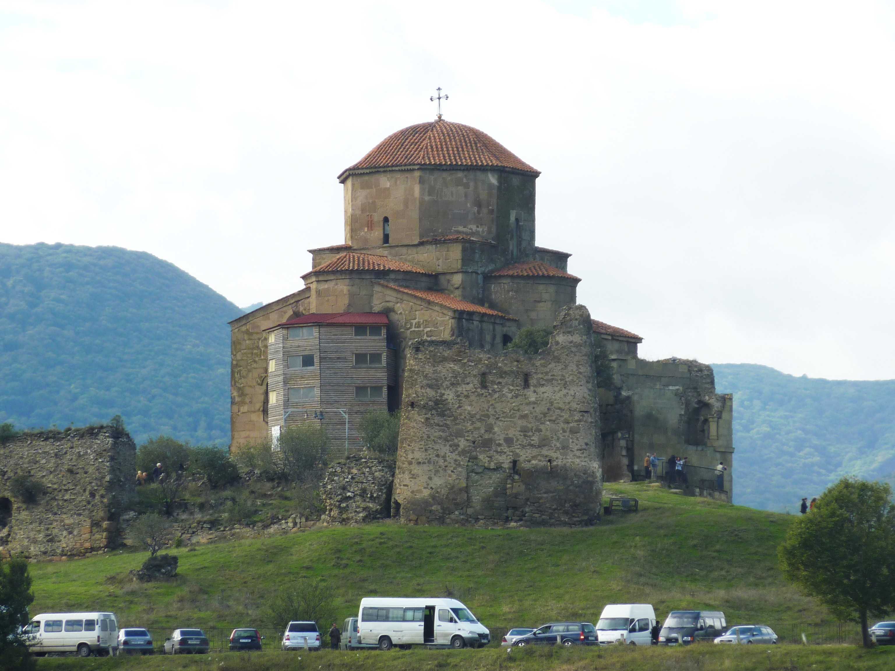 Le monastère de Djvari près de Mtskhéta